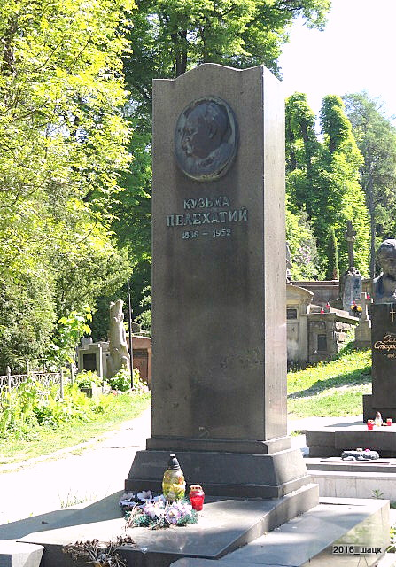 Памятник на могиле Кузьмы Николаевича Пелехатого (1886—1952) — западно-украинского советского писателя, поэта, журналиста и общественного деятеля во Львове на Лычаковском кладбище .